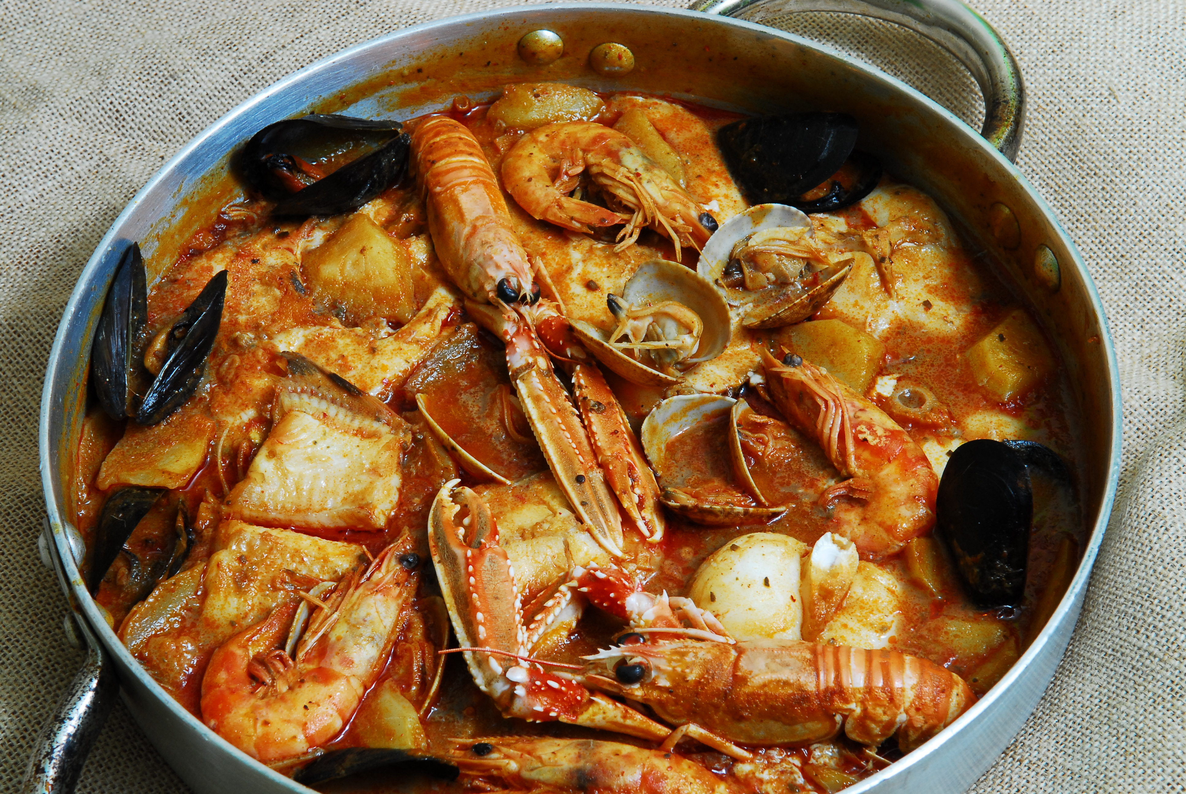 Foto del plato típico de l'Ametlla de Mar es suquet calero.